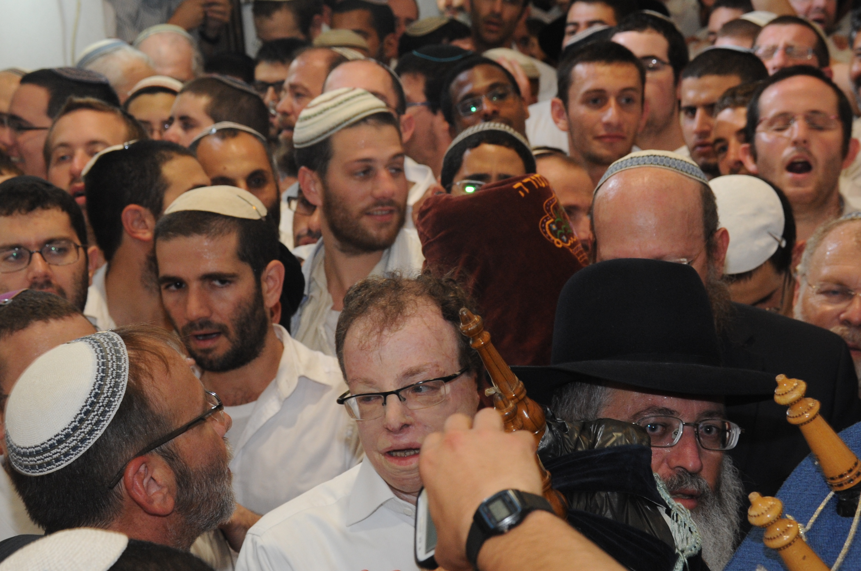 הרב ענתבי ודב קלמנוביץ